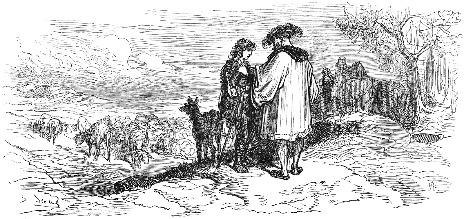 grafika z książki PL Bajki, Jean de La Fontaine, nakładem i drukiem Jana Noskowskiego, Warszawa 1876